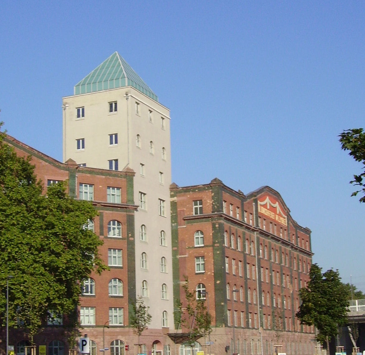 Walzmühle (former mill, now shopping centre), Ludwigshafen am Rhein, Rheinland-Pfalz (Germany)